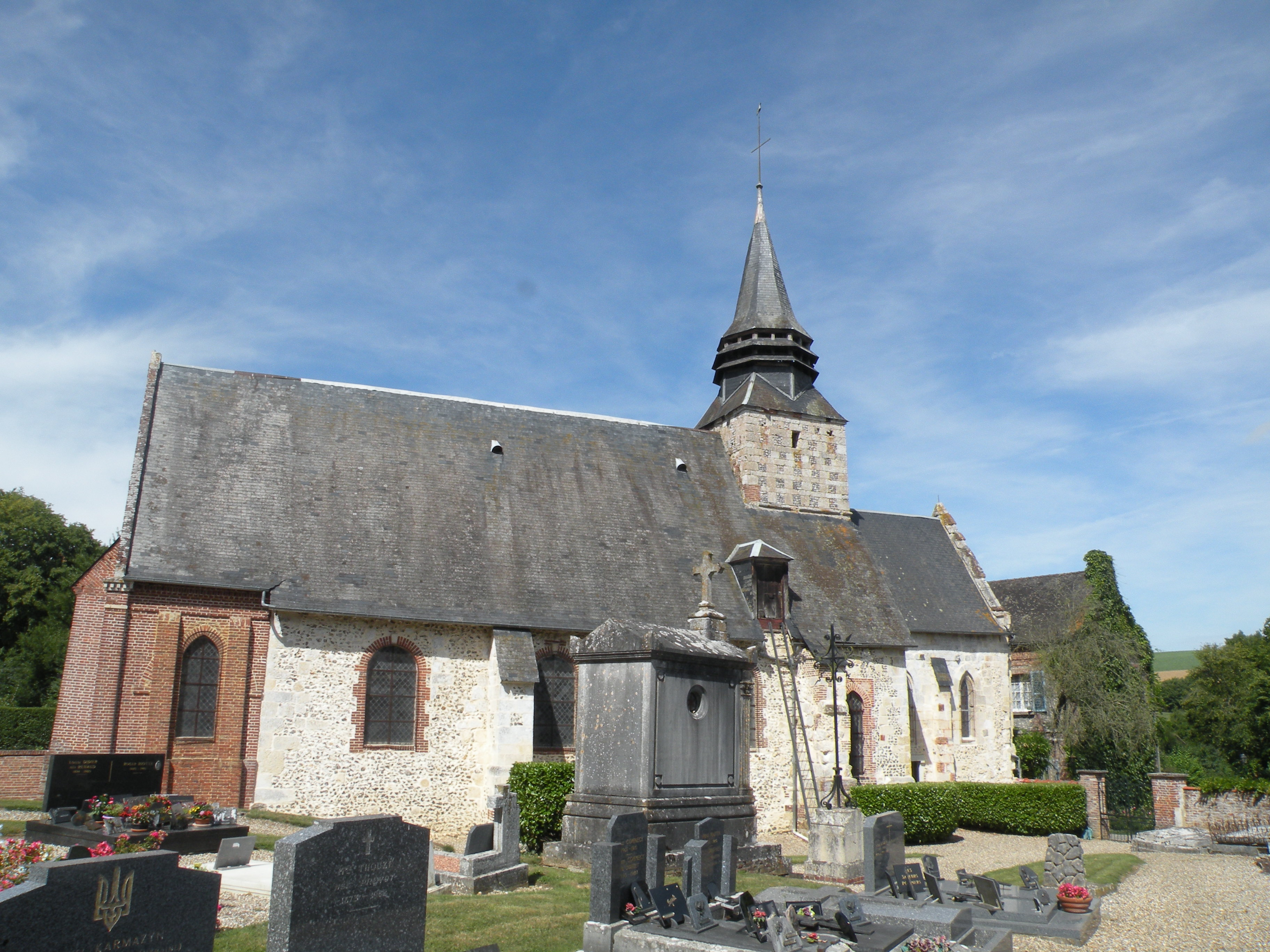 église Saint-Sulpice de Roy-Boissy